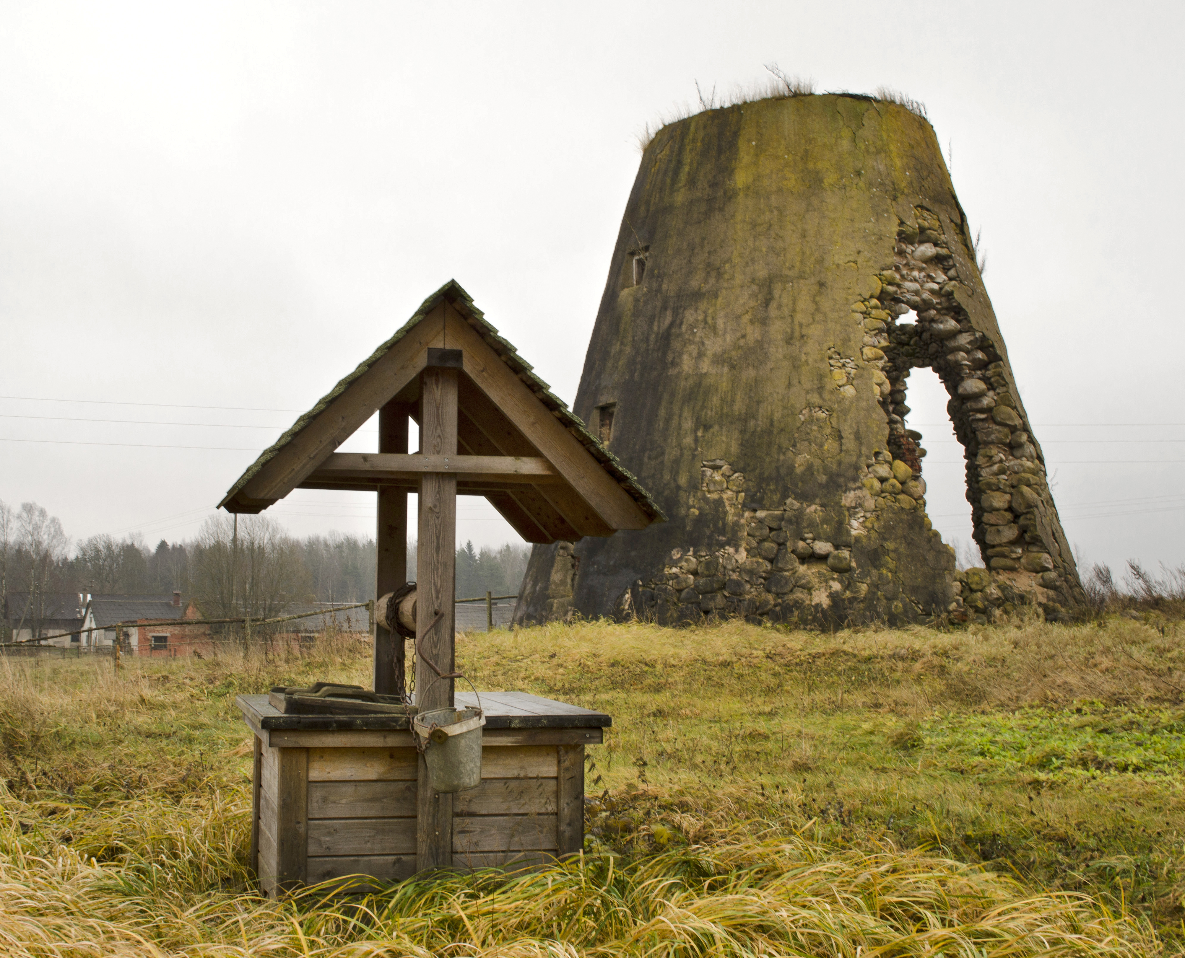 Vējdzirnavas Vērsī / windmill